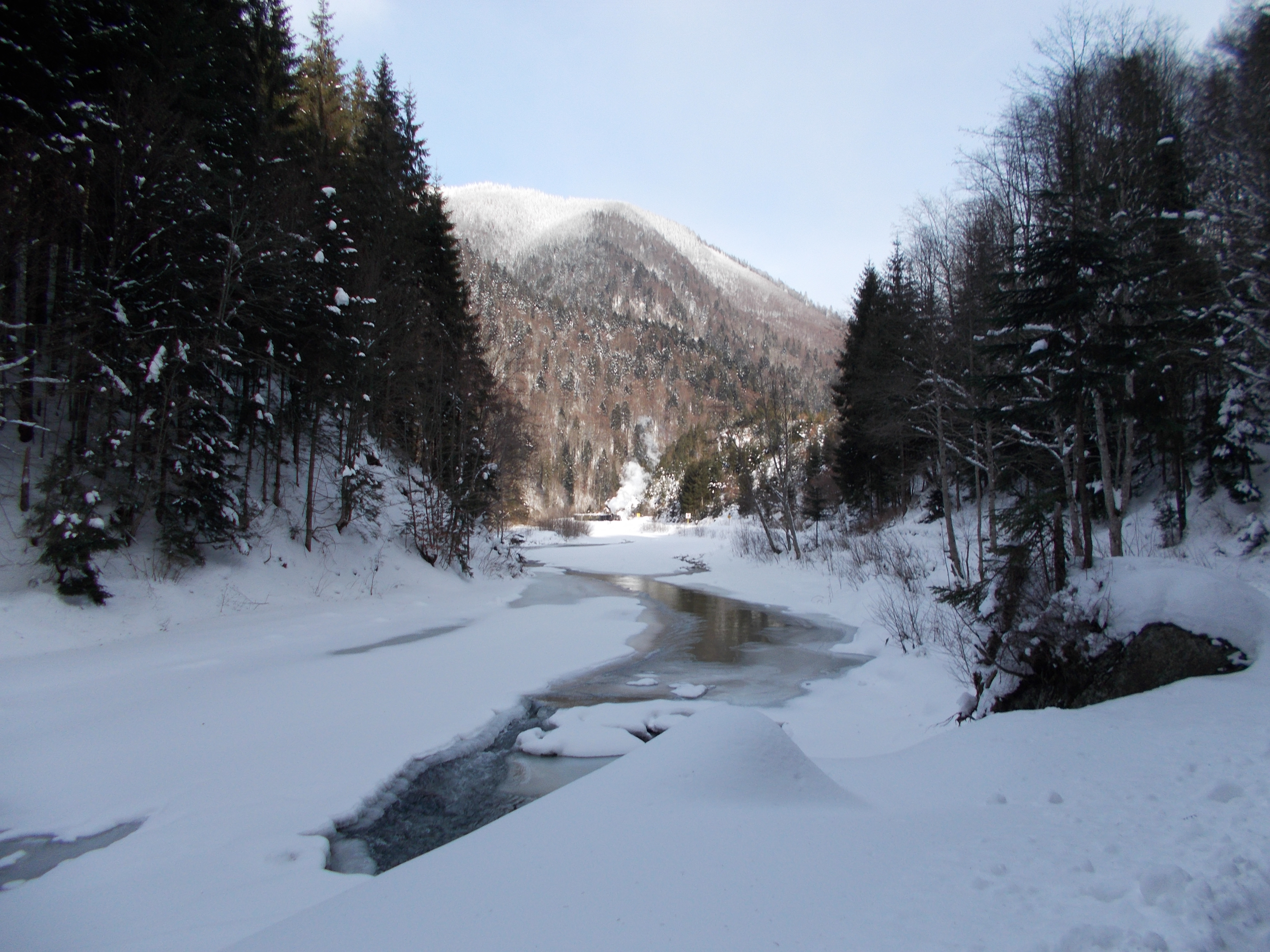 Râul Vaser, Maramureș, România